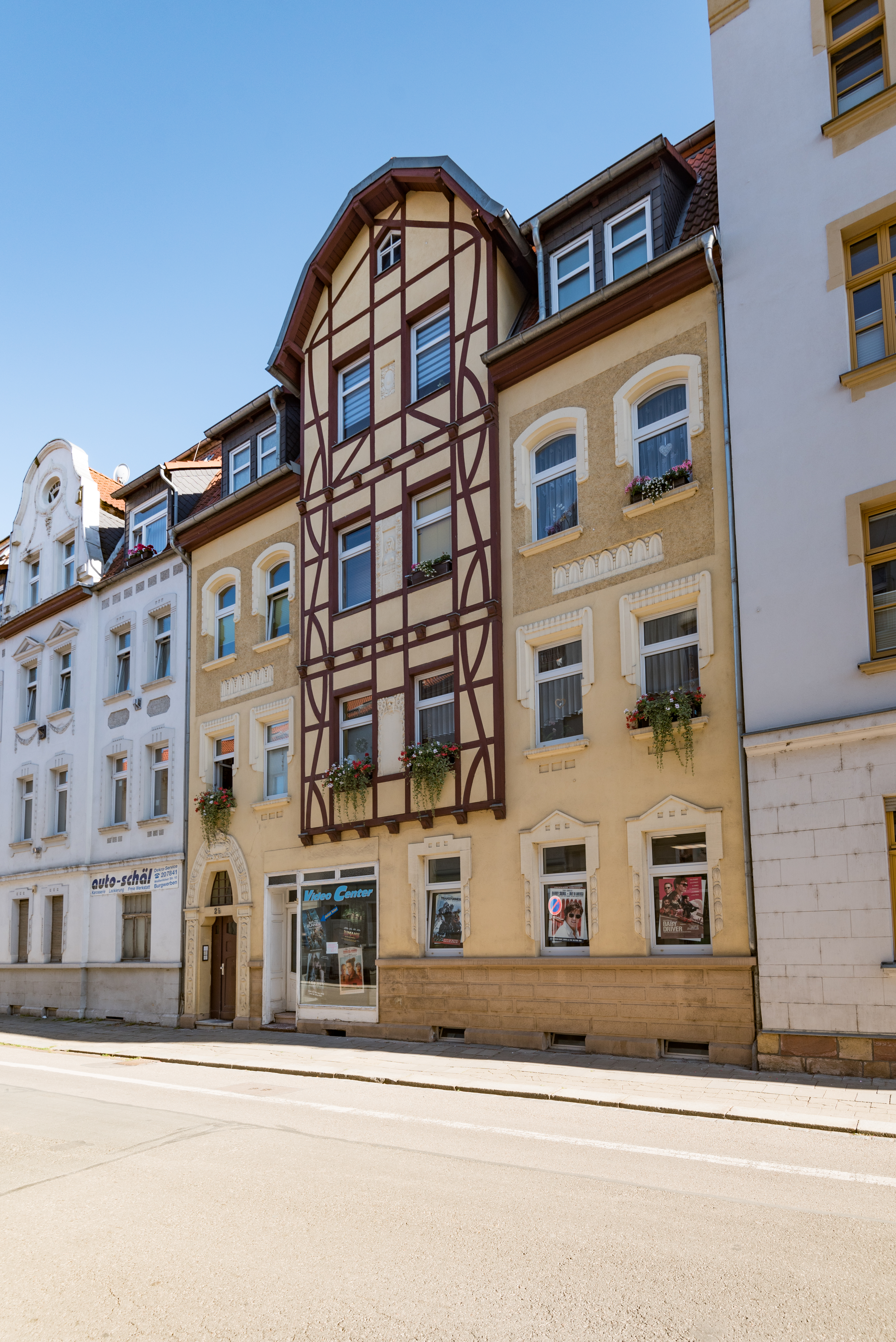 Weißenfels, Beuditzstraße 2b